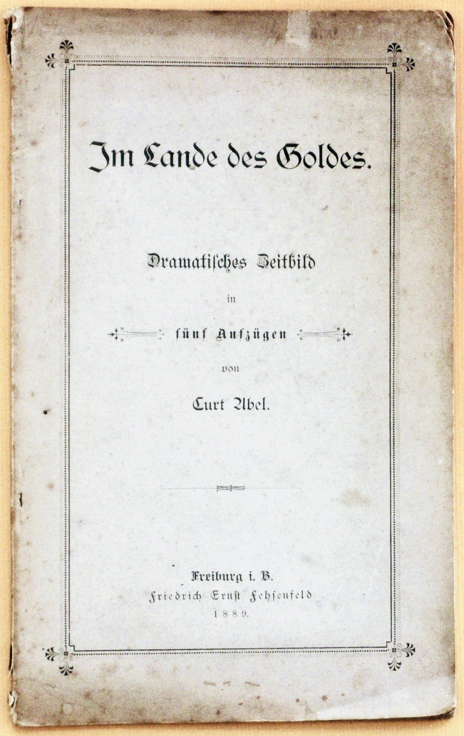 Curt Abel: In het land van goud. Uitgeverij Friedrich Ernst Fehsenfeld, Freiburg im Breisgau 1889.